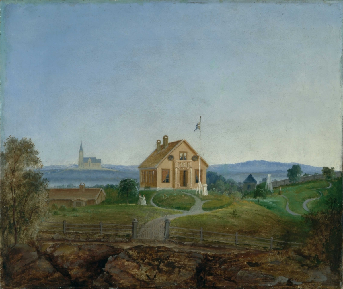 Karlstad løkke ved Bogstadveien (vest for Rosenborggata), kjøpt av Peder Balke i 1856 og her malt av ham i 1858. I bakgrunnen ses Vestre Aker kirke. Eiendommen ble utparsellert til det som ble kalt Balkeby, som brant i 1879 og for øvrig er revet. Navnet er gjenbrukt i et blokkvartal fra 1938.